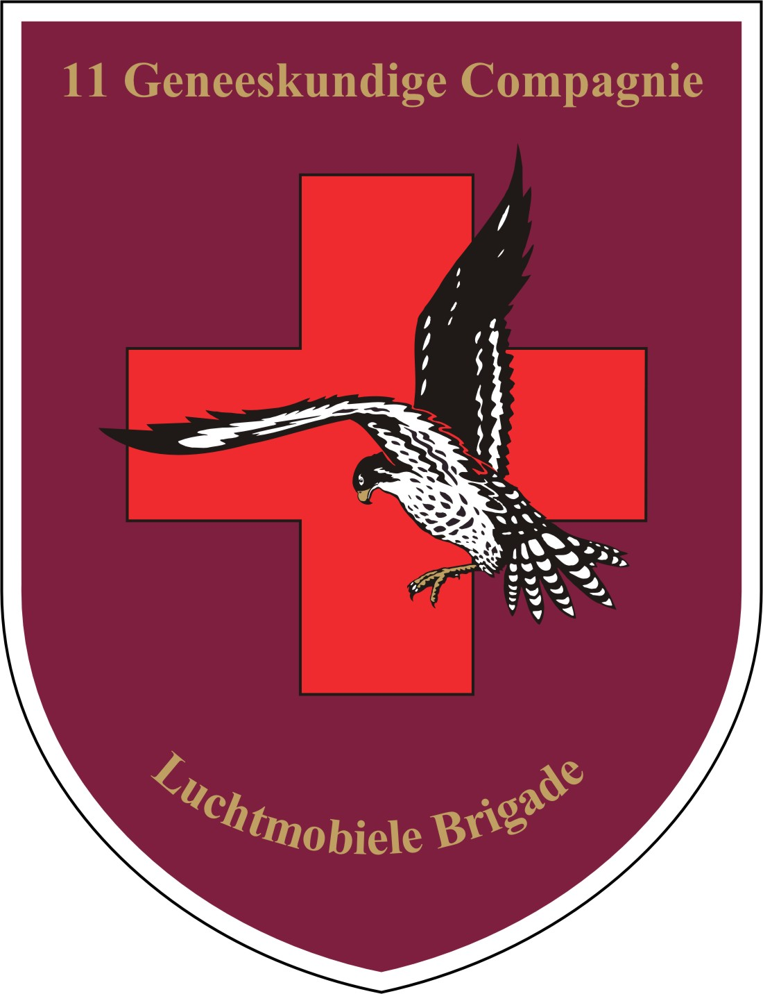 logo 11 gnkcie